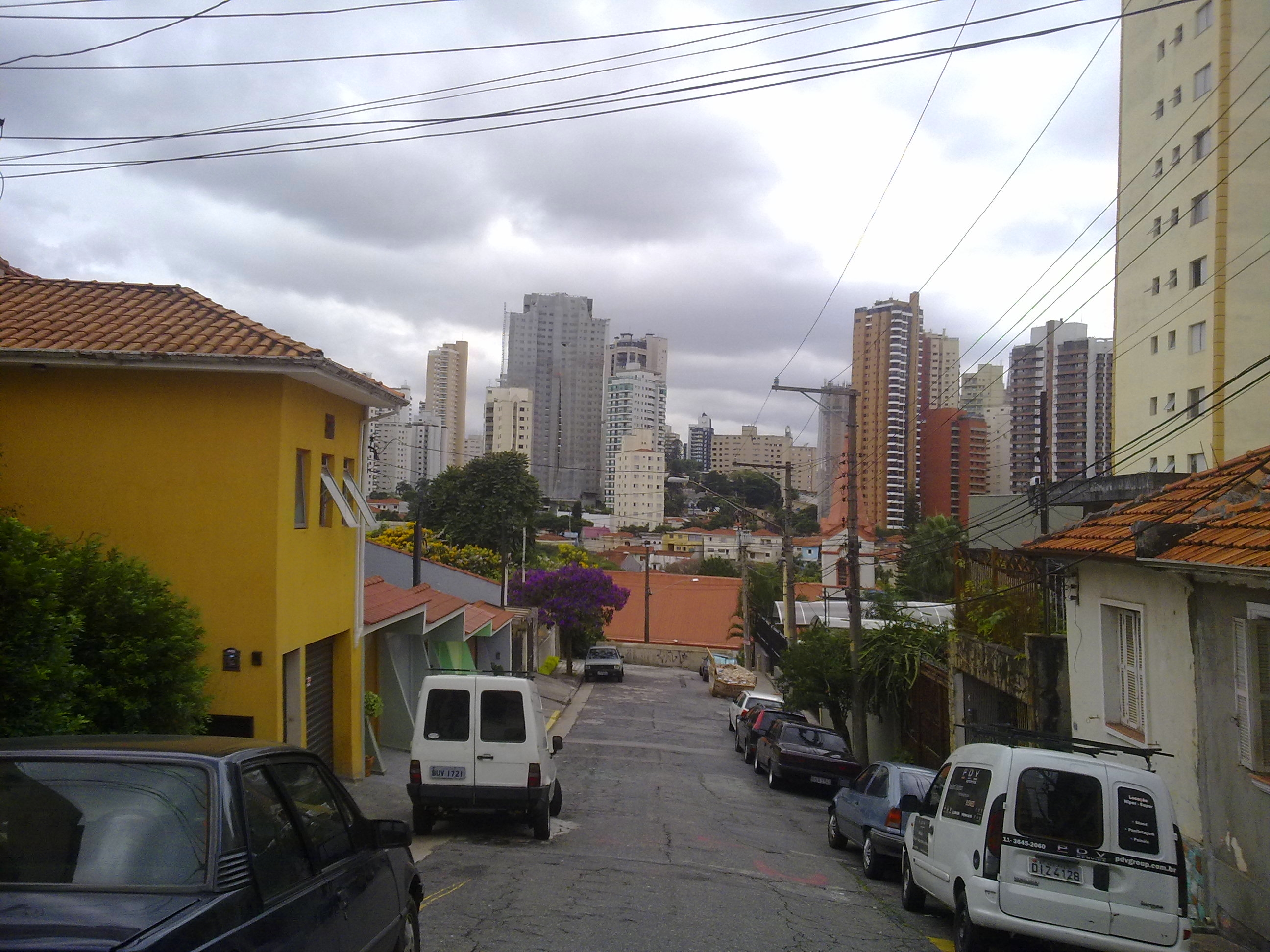 Foto do bairro de Santa Terezinha e ao fundo o Alto de Santana, zona norte da cidade de São Paulo.